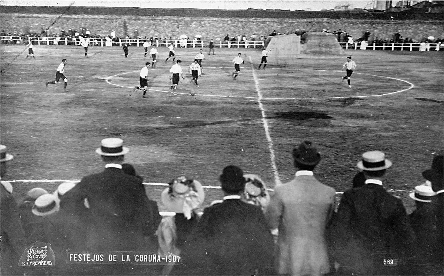 Festexos da Coruña (1907) A fotografía máis antiga do Deportivo.jpg